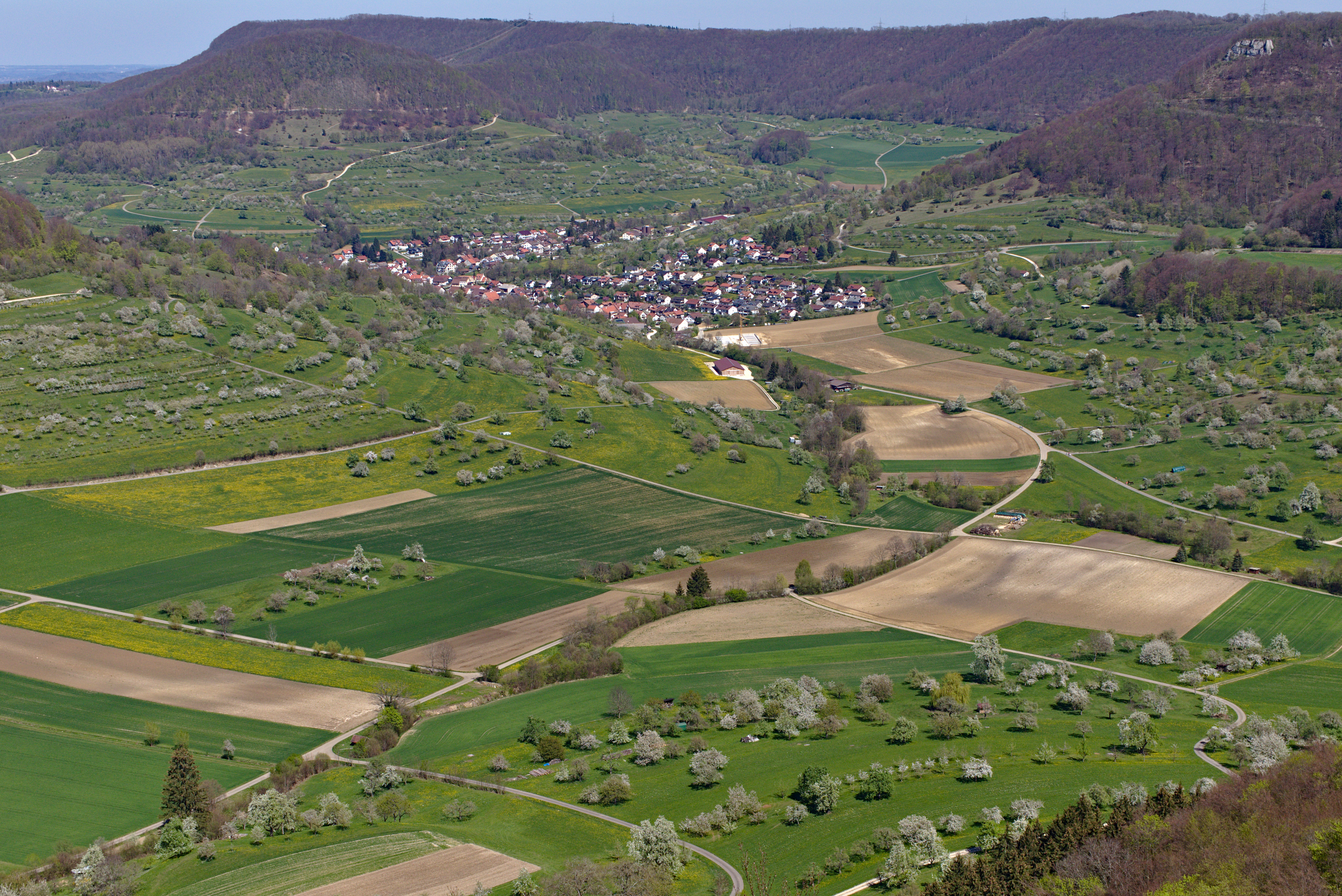 Blick auf Neidlingen, Landkreis Esslingen, Baden-Württemberg von der Hindenburghütte aus.